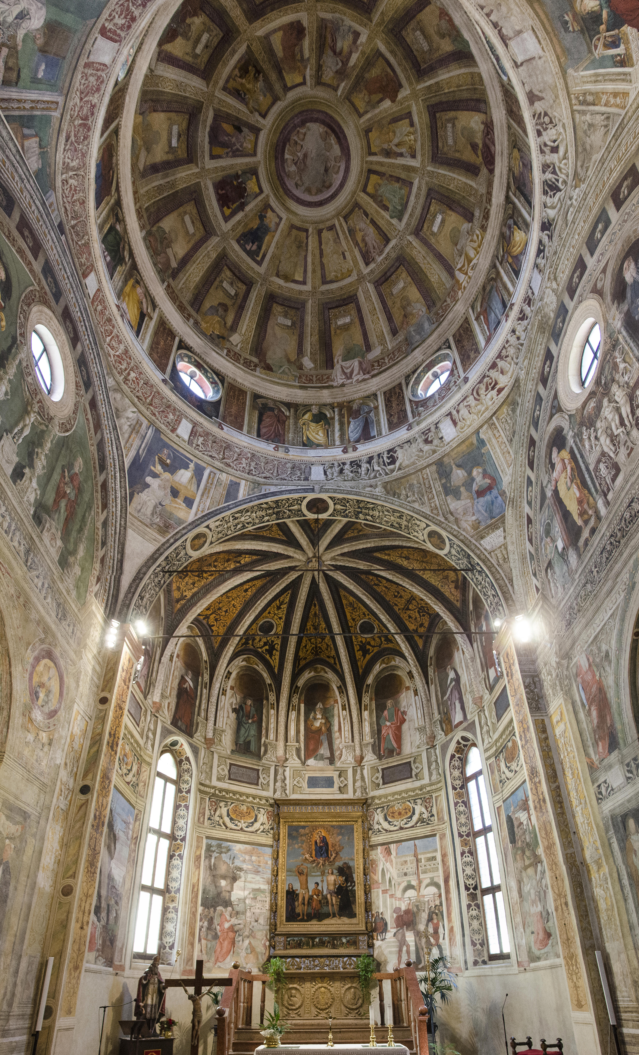 Chiesa dei Santi Nazaro e Celso a Verona. Interno, in stile rinascimentale.